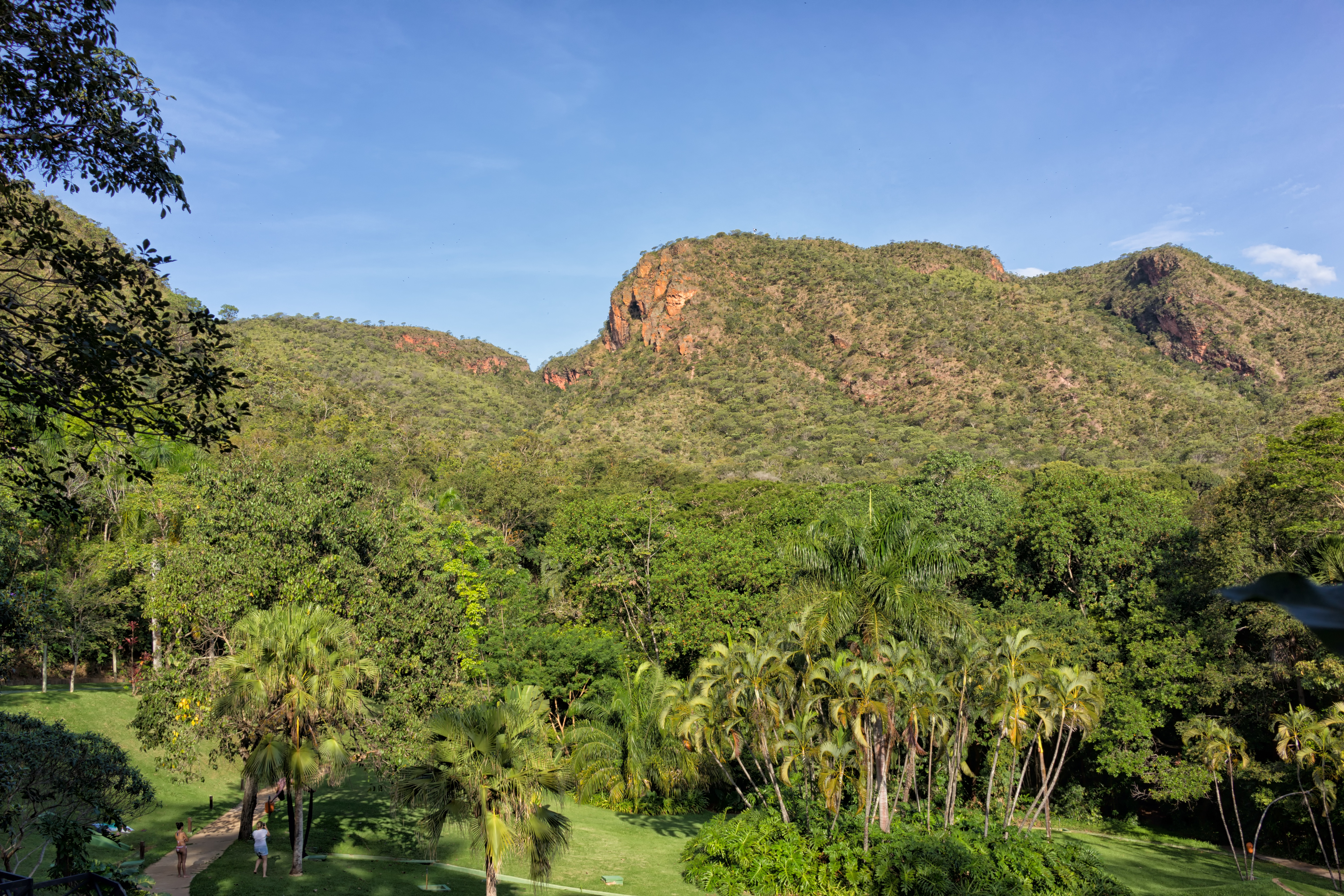 Rio Quente